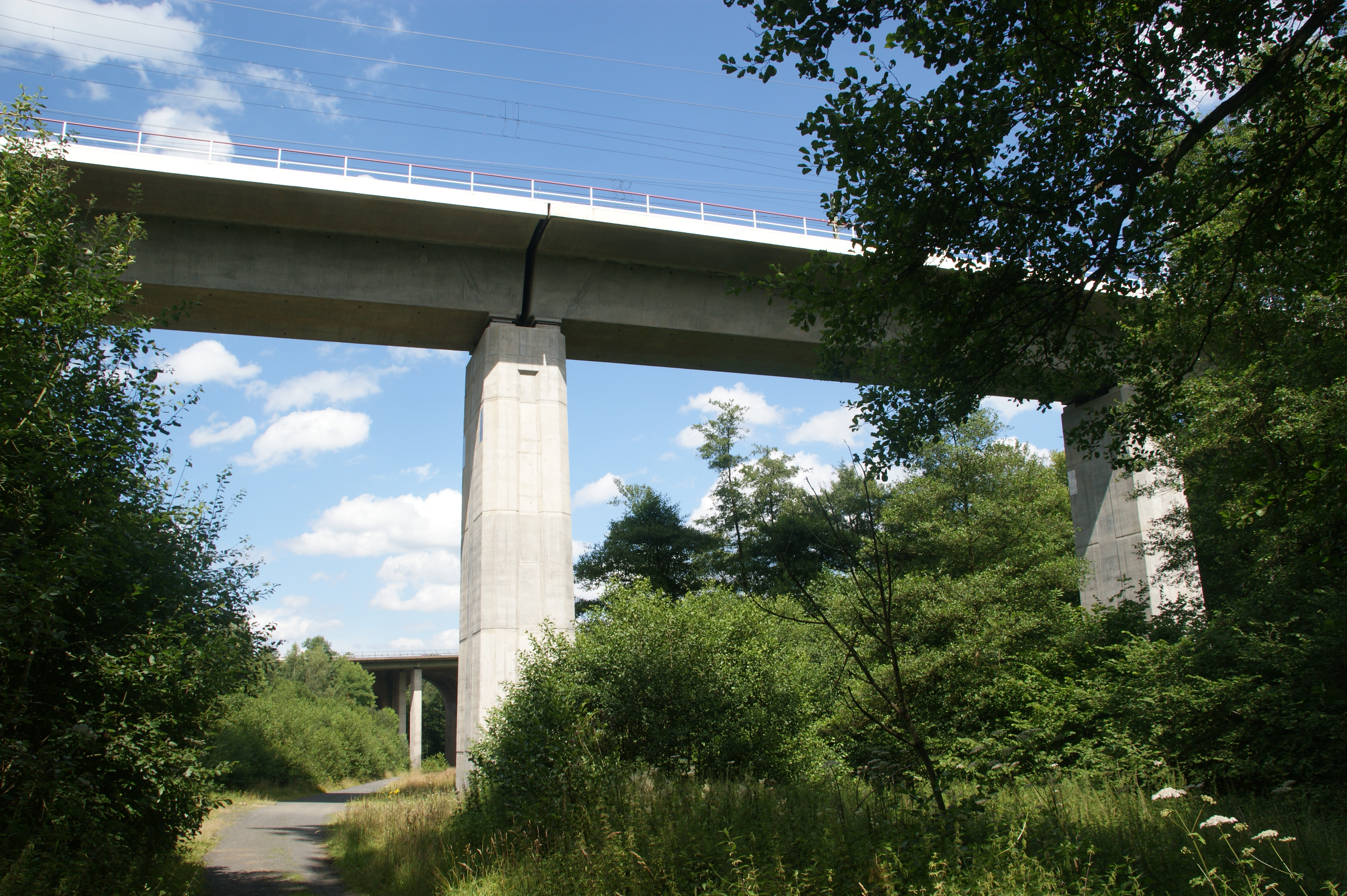 Logebachtalbrücke der Eisenbahn-Schnellfahrstrecke Köln–Rhein/Main, im Hintergrund Talbrücke Logebach der Bundesautobahn 3